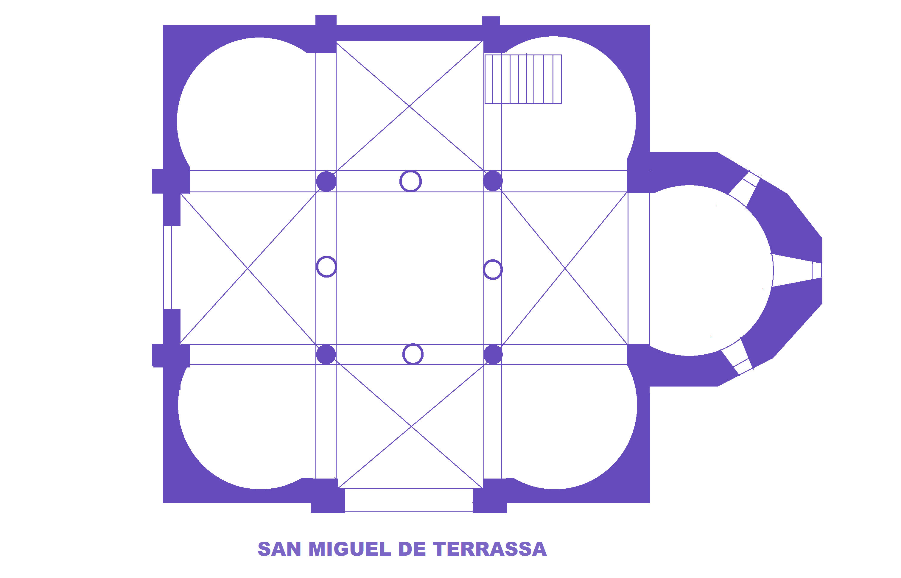 San Miguel de Terrassa, Espagne, Plan